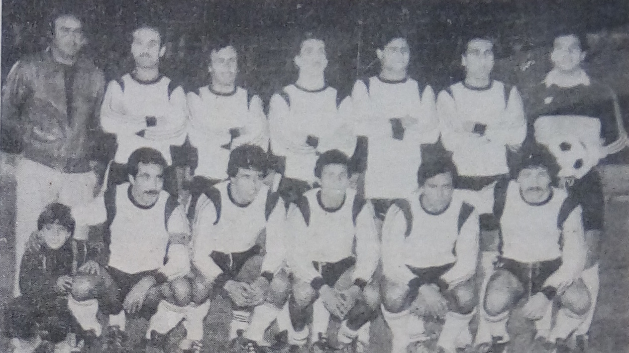 Assabah 1980